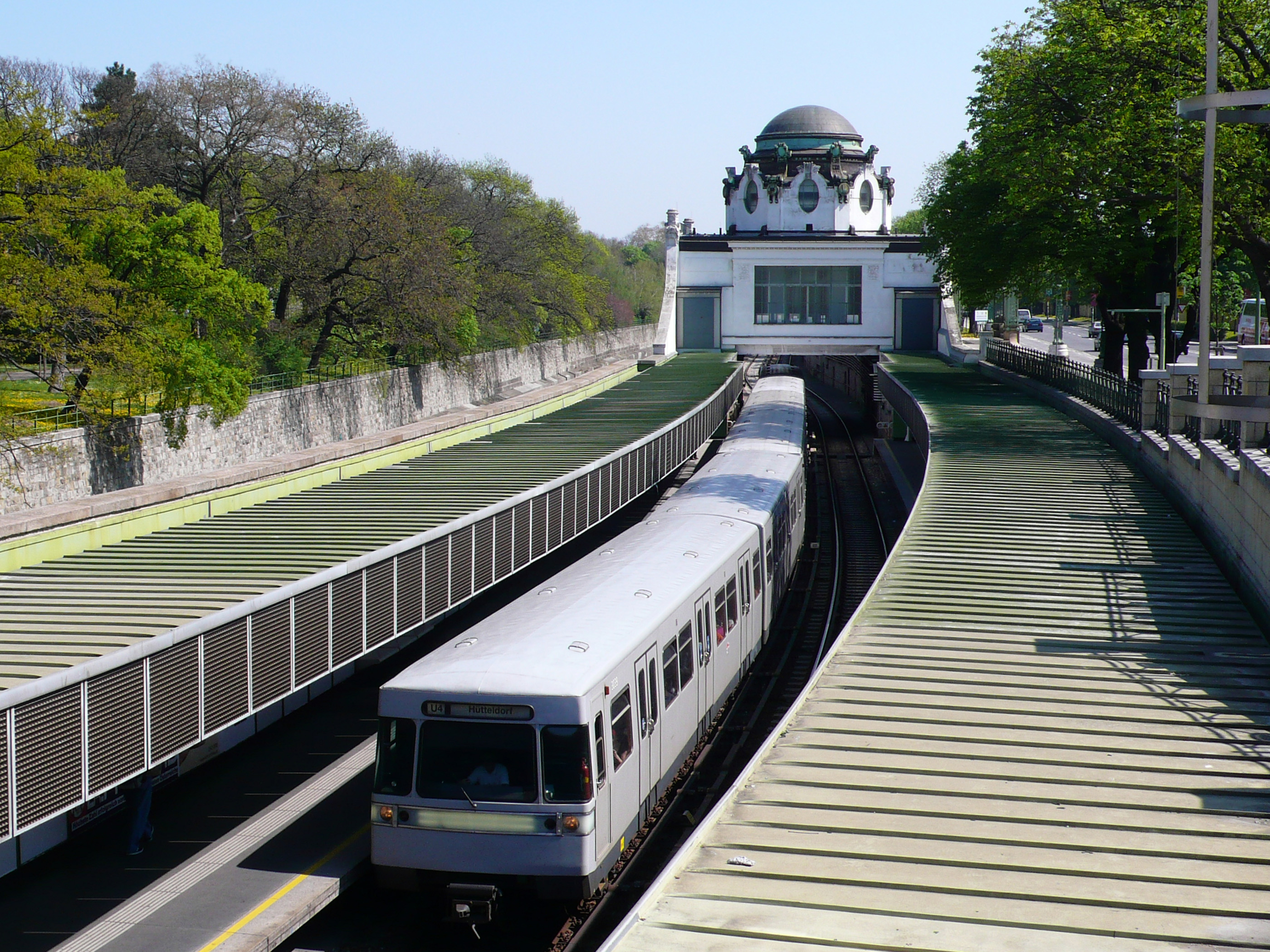 Wien Stadtbahn (U-Bahn), Hofpavillon Hietzing; Otto Wagner